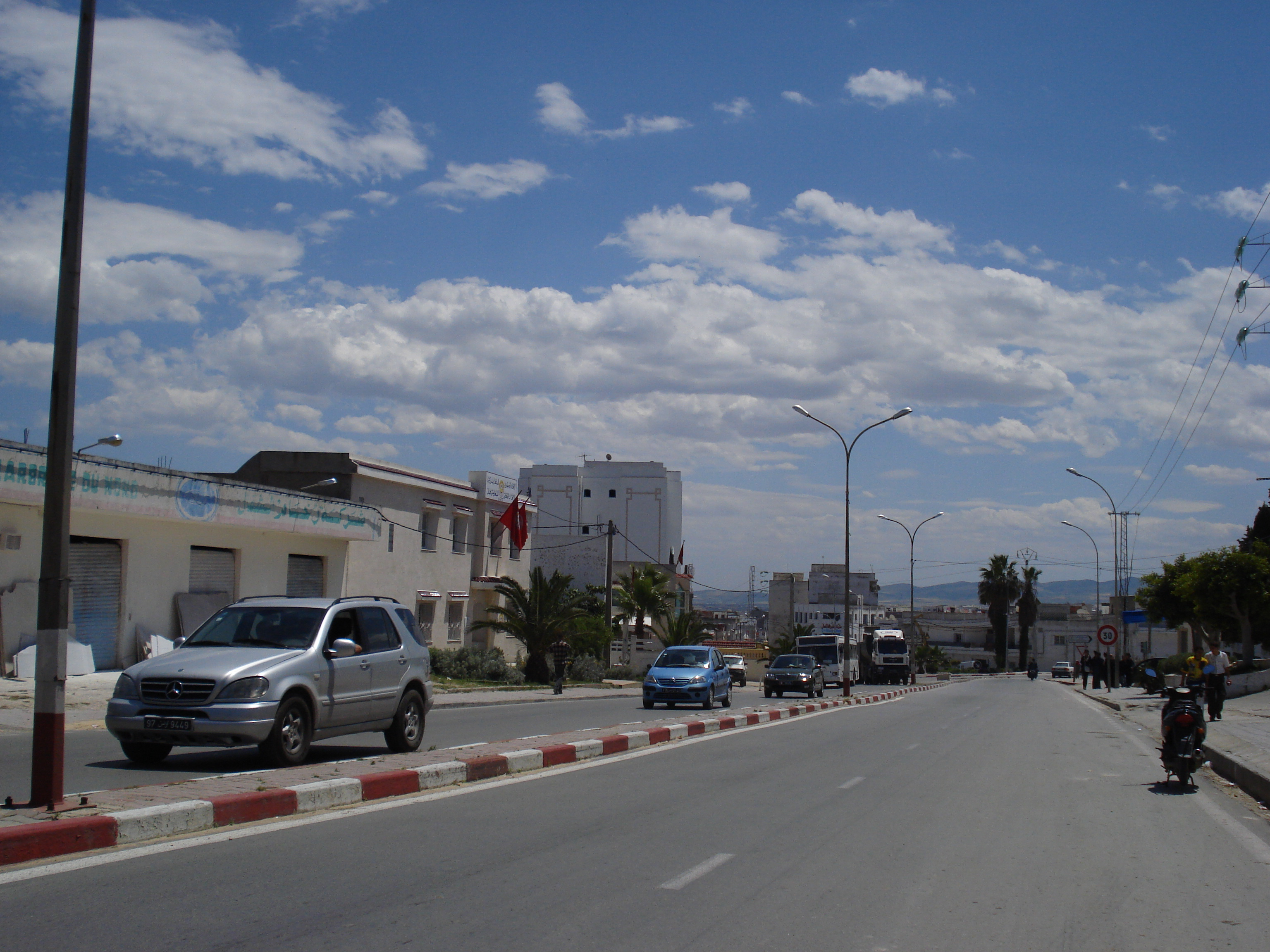 Menzel Jemil, Tunisie